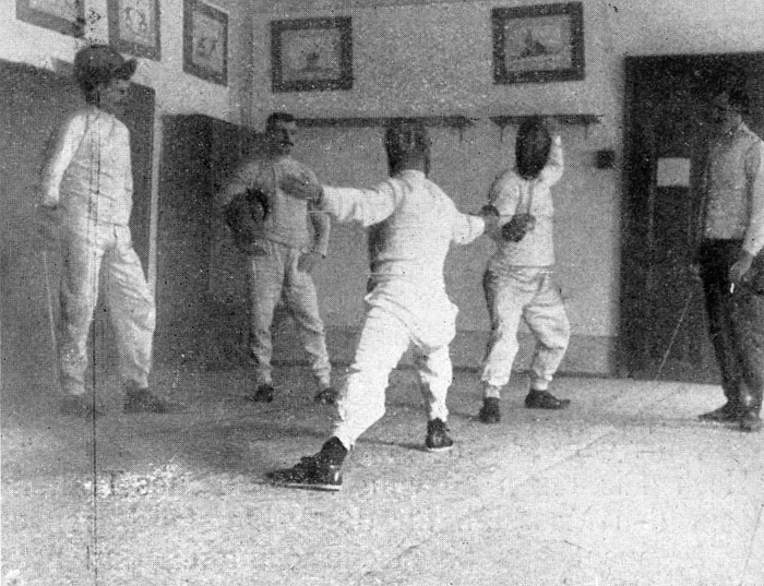 Florettfechten im k.u.k. Militär Fecht- und Turnlehrerinstitut